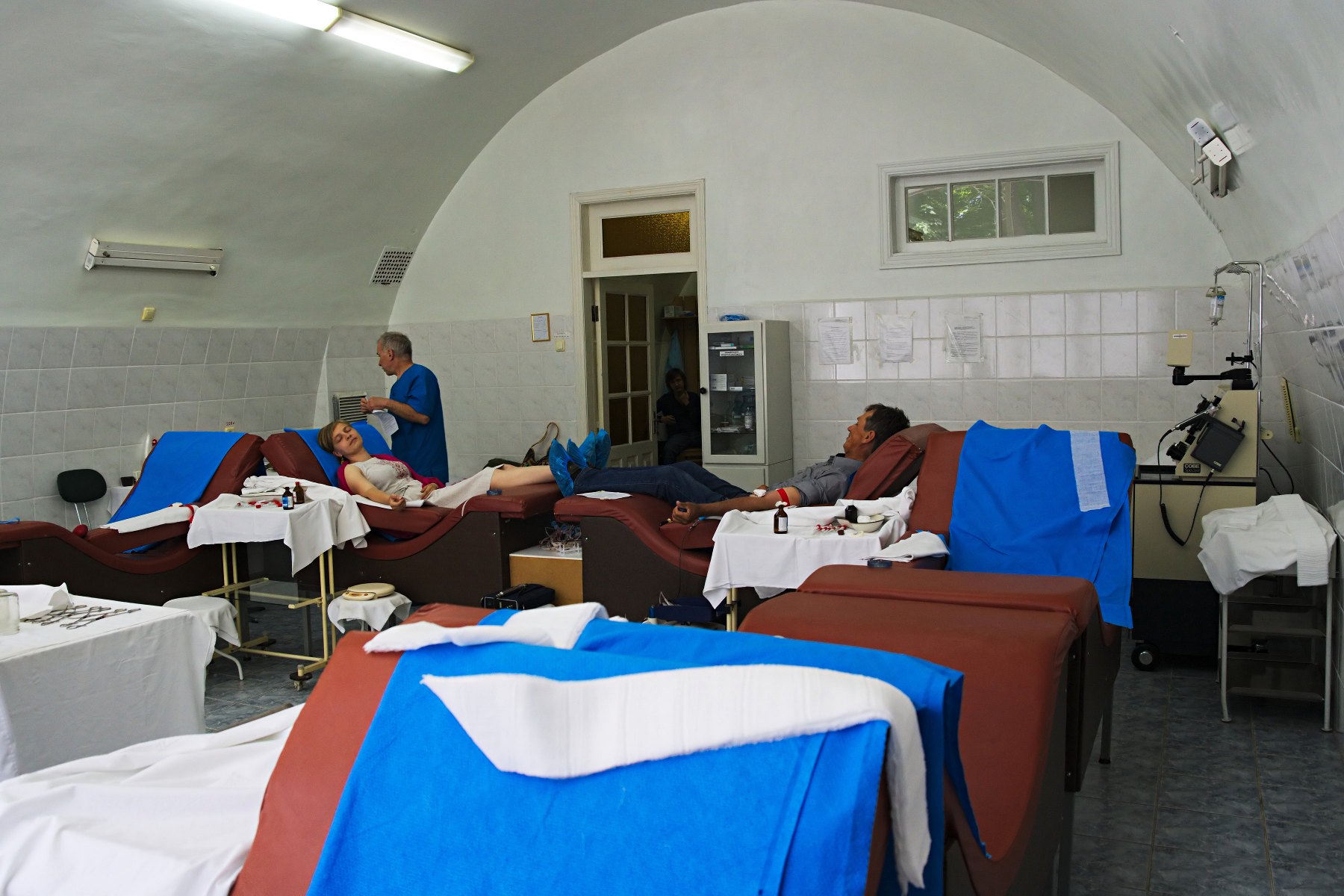 Центр крові ГВКГ, маніпуляційна